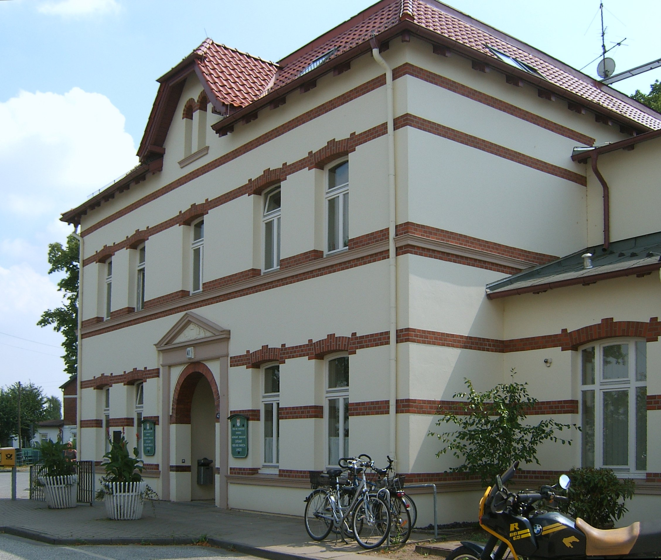 Hamburg, Altengamme, Ortsamt